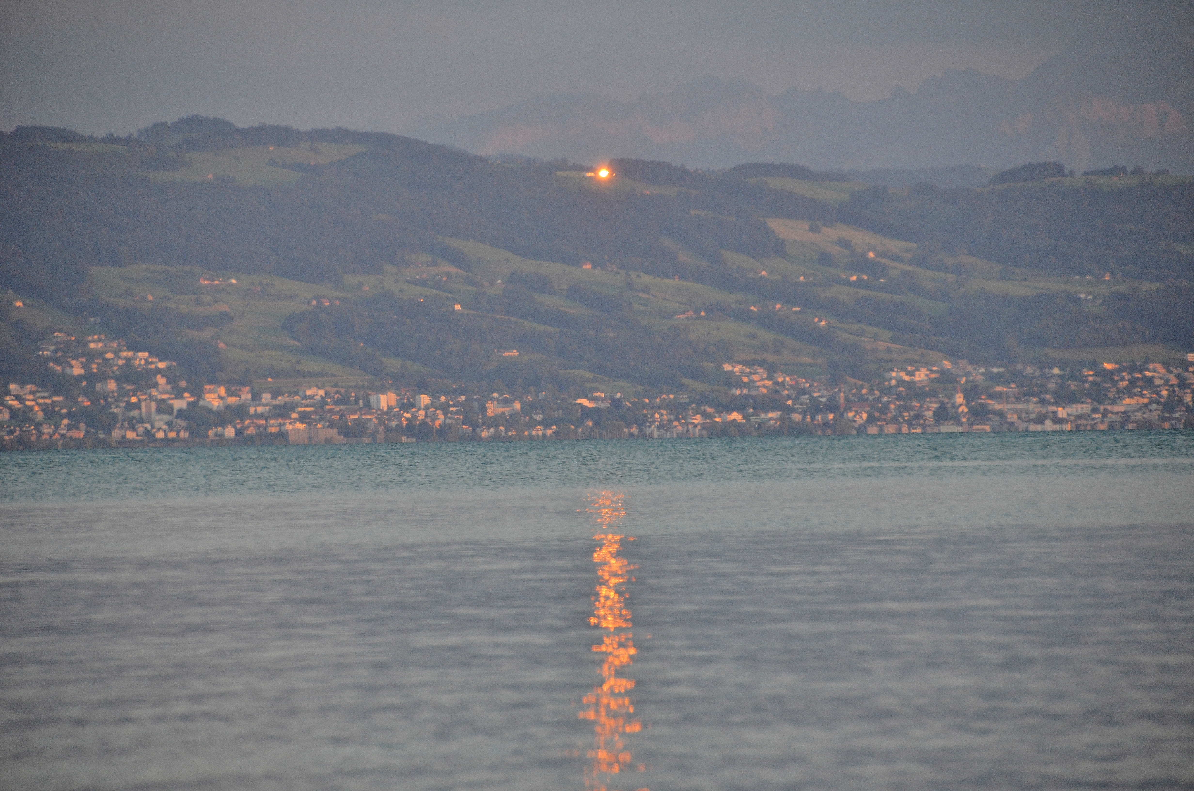 Spiegelung der Sonne. Blick von Kressbronn nach Rorschach am schweizerischen Seeufer.